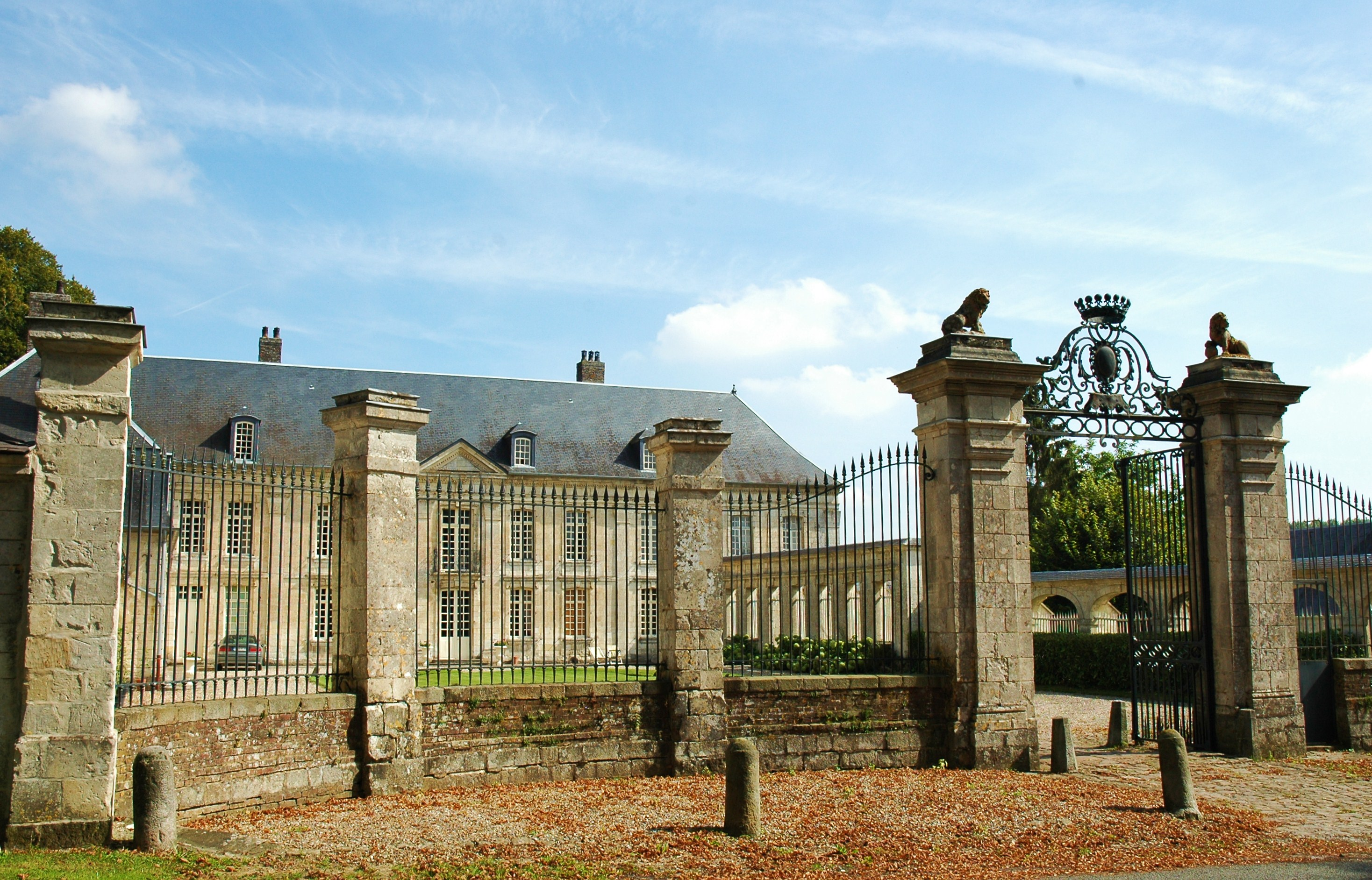 Raincheval (Somme, France). Le château.